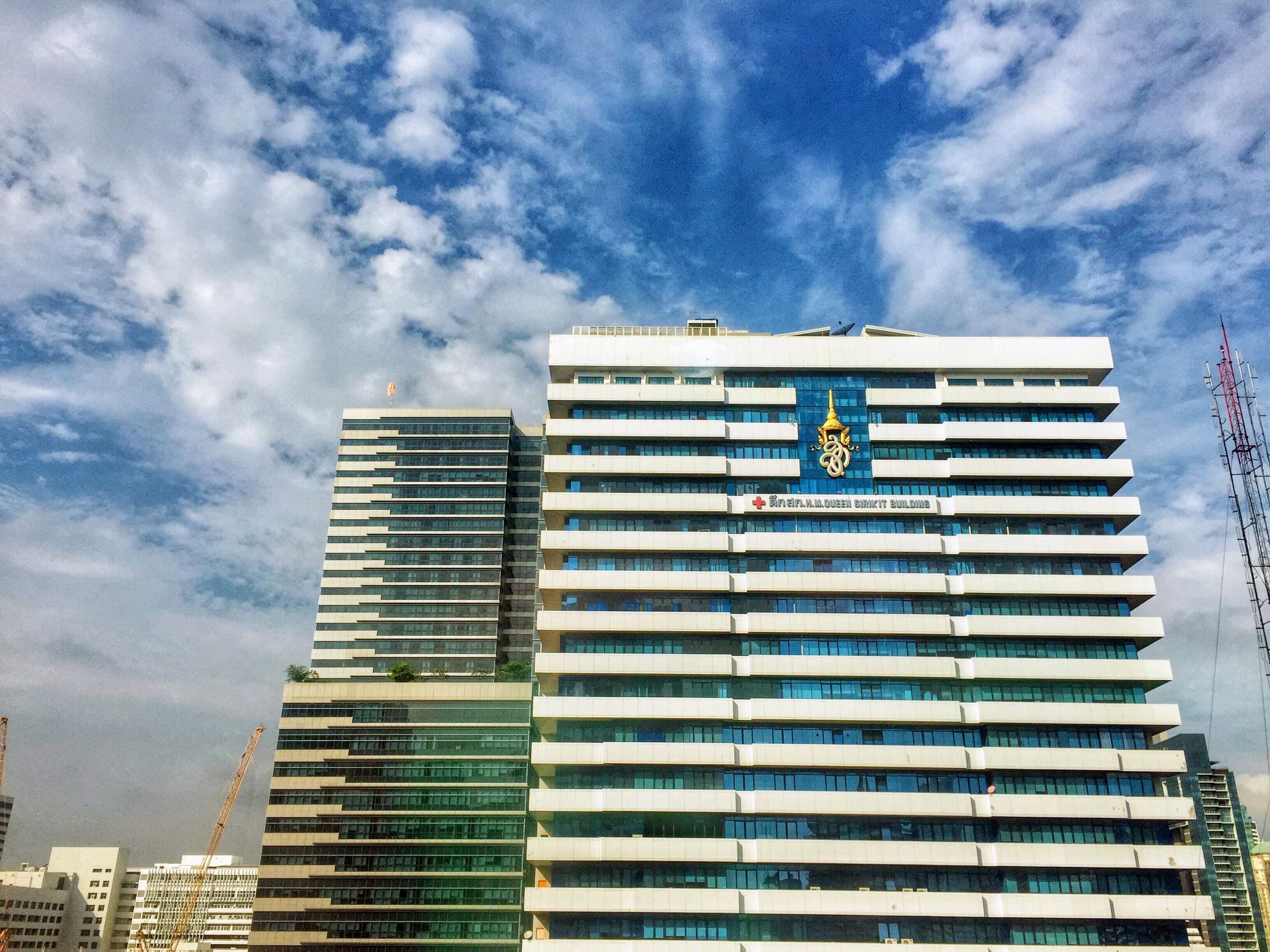 อาคาร สก. โรงพยาบาลจุฬาลงกรณ์ สภากาชาดไทย